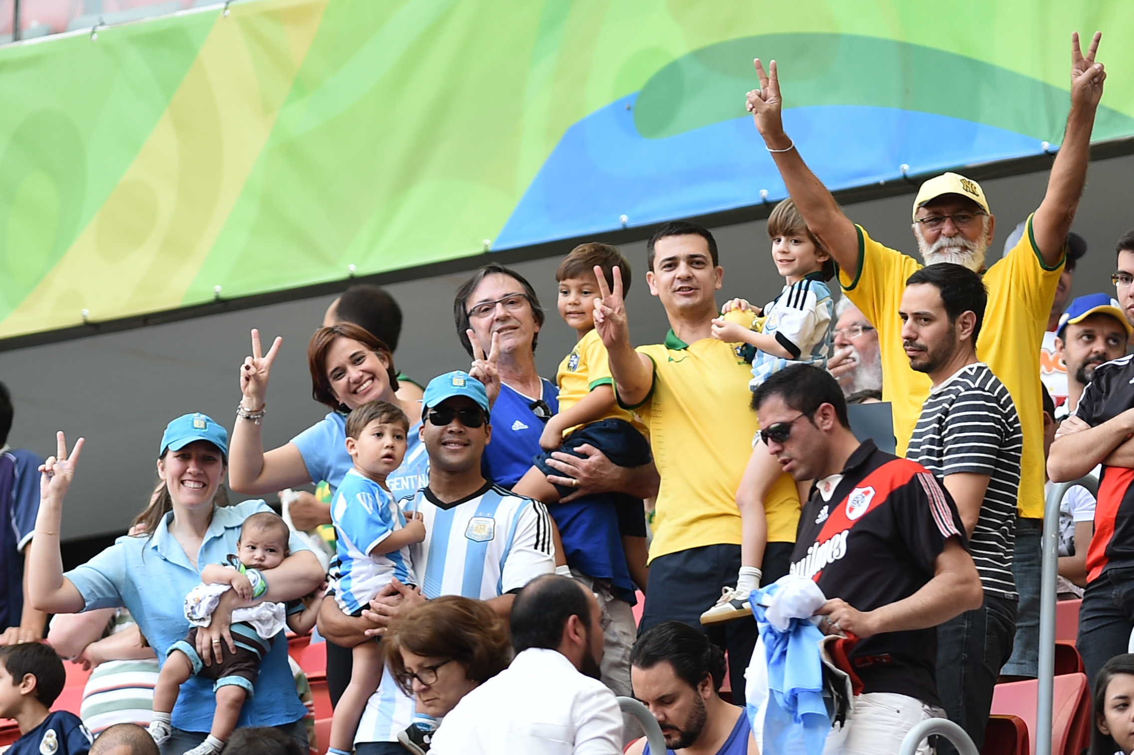 Estádio Nacional de Brasília Mané Garrincha, Brasília, DF, Brasil, 10/8/2016 Foto: Andre Borges/Agência Brasília Argentina e Honduras empataram por 1x1 nesta quarta-feira (10), no Estádio Mané Garrincha, em partida pelo grupo D do futebol masculino nas Olimpíadas 2016. O placar classificou Honduras para a próxima fase da competição e tirou a seleção argentina masculina da Olimpíada. Partido entre Argentina y Honduras por fase de grupos.